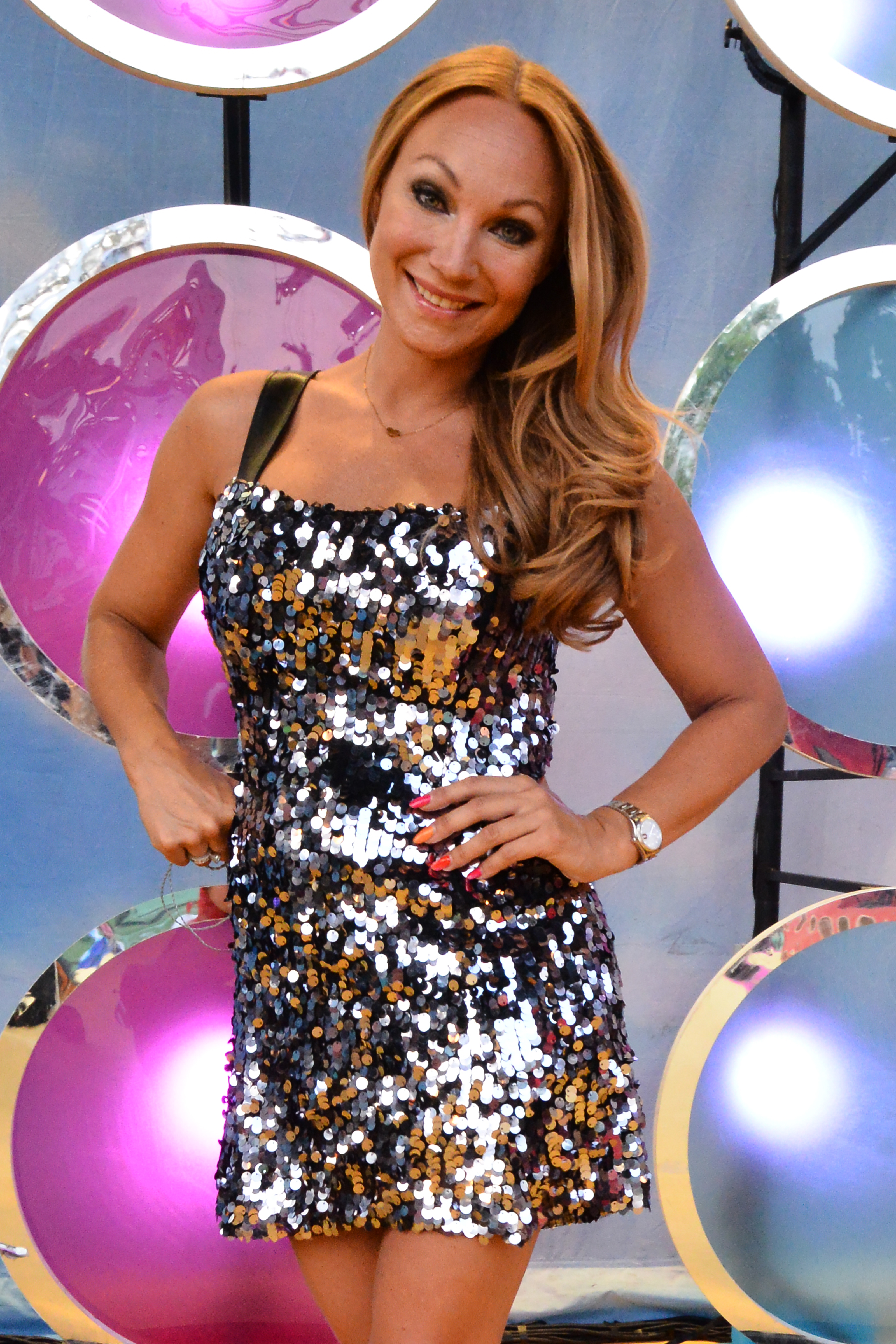 Charlotte Perrelli på Sommarkrysset.